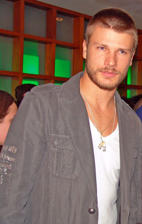 O ator e modelo brasileiro Rodrigo Hilbert